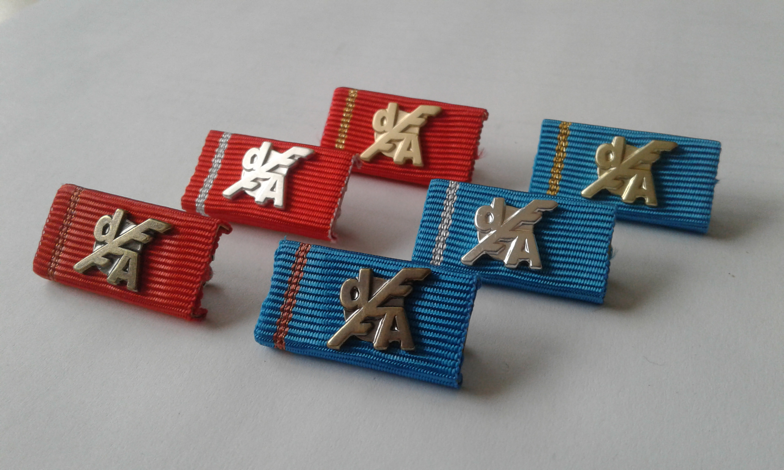 Bandschnalle dFFA